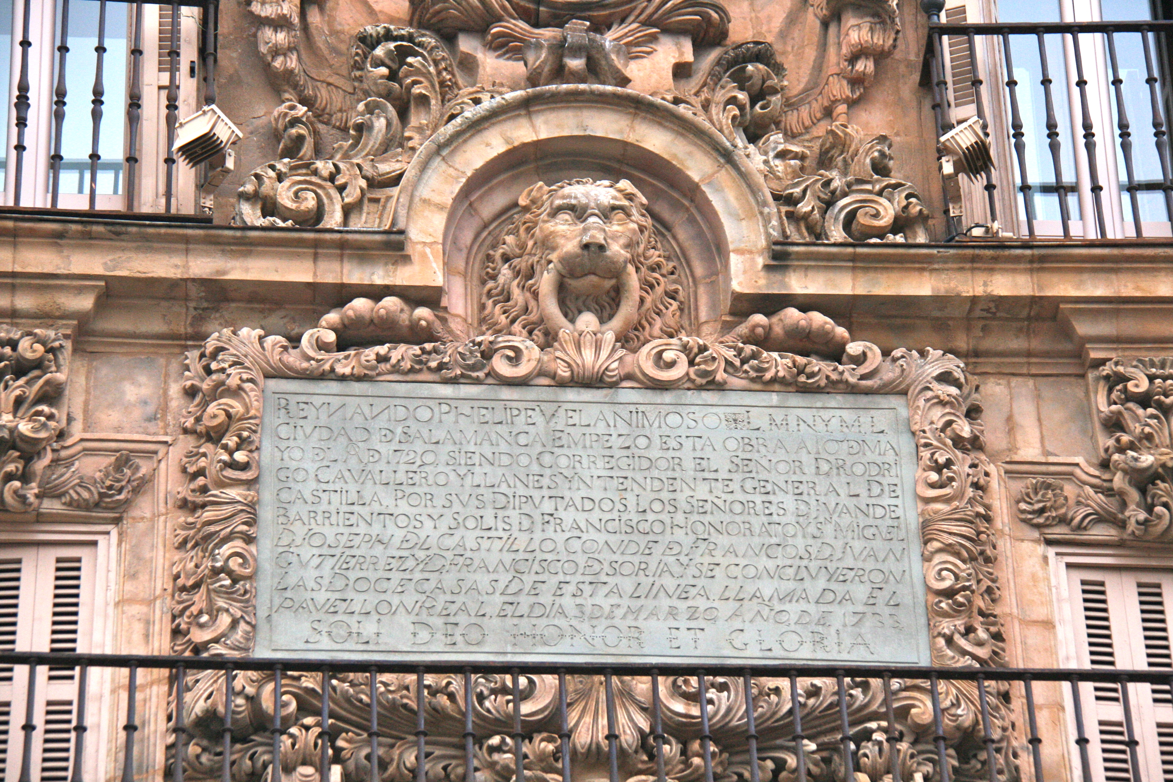 Placa conmemorrativa - Plaza Mayor de Salamanca